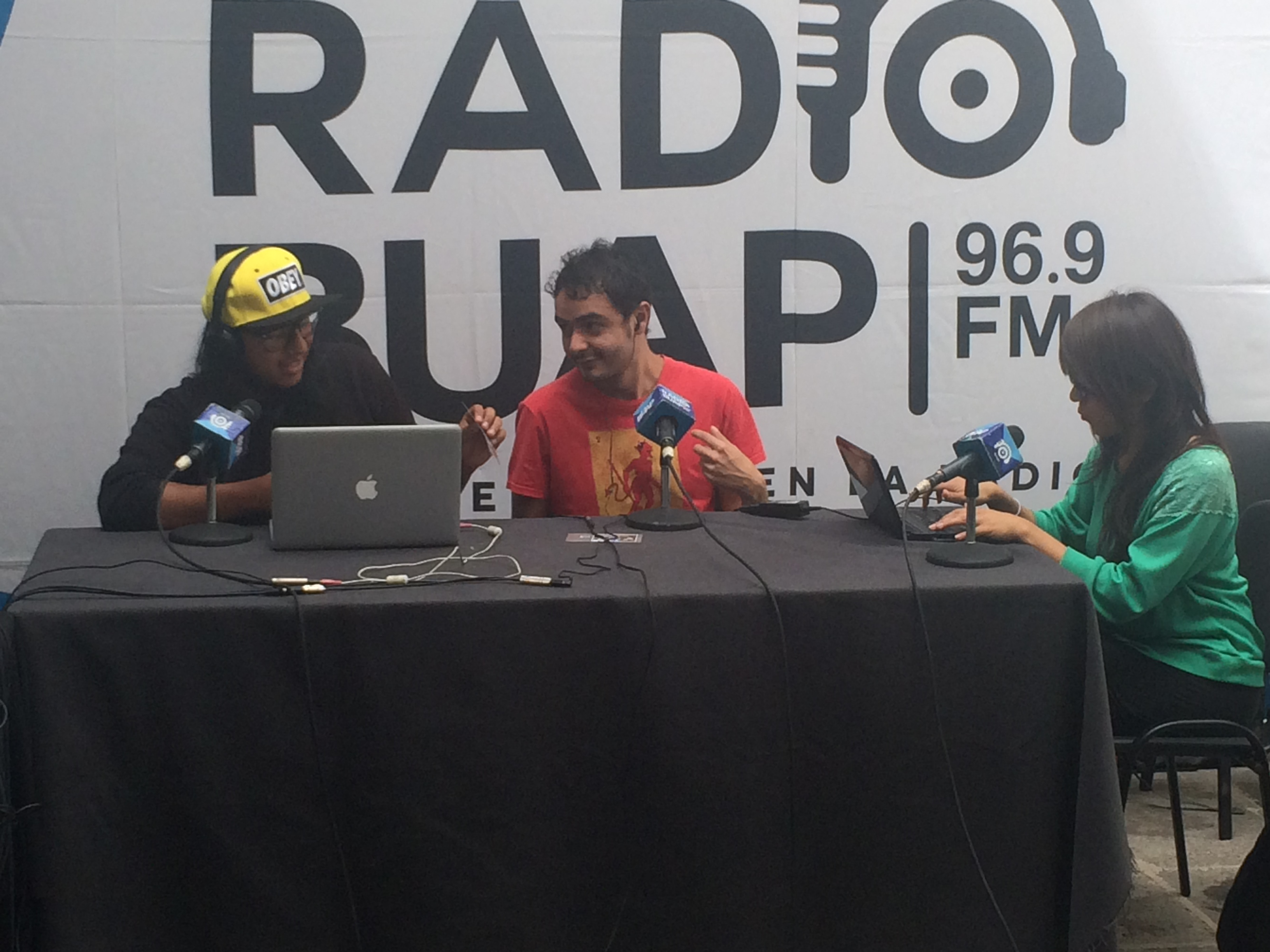 Enlace en vivo de Radio BUAP